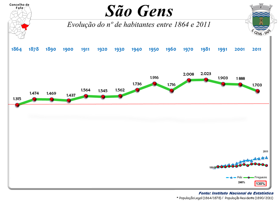 Censos 1864/2011